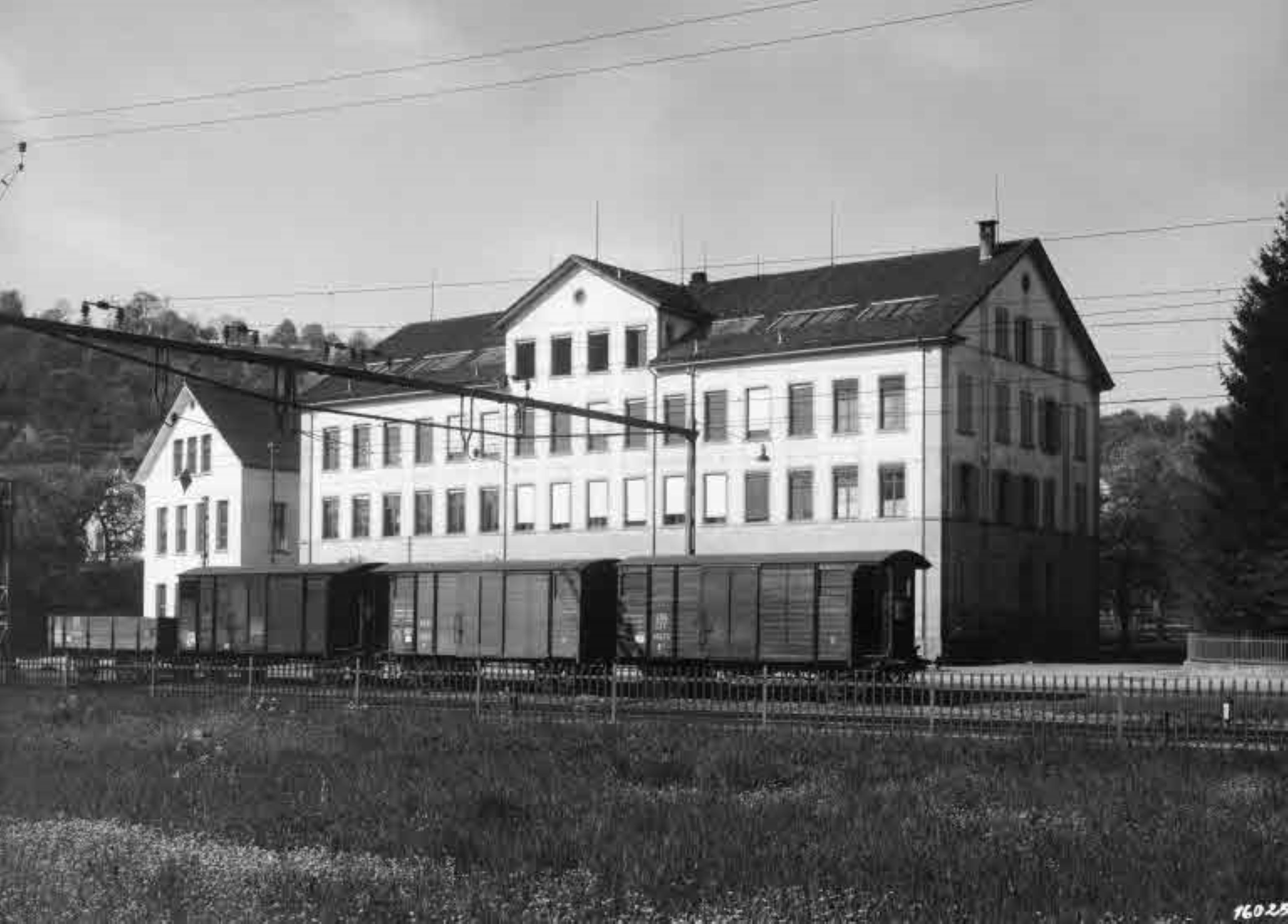 Seidenzwirnerei Zinggeler, Richterswil ZH, Schweiz